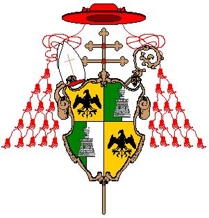 Stemma del Cardinale Carlo Gaetano Stampa, Arcivescovo di Milano.